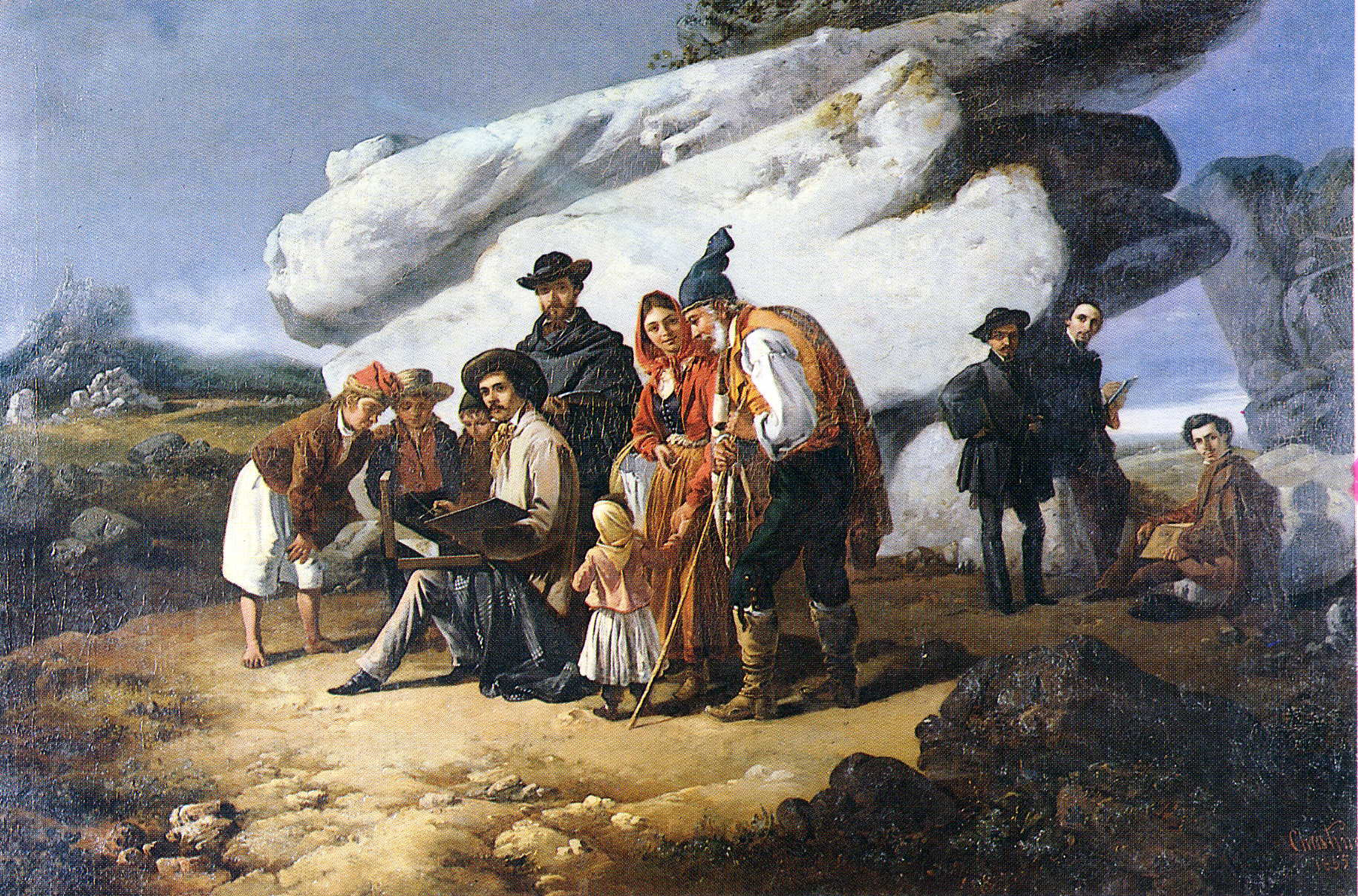 Primeiro retrato colectivo de artistas feito em Portugal.